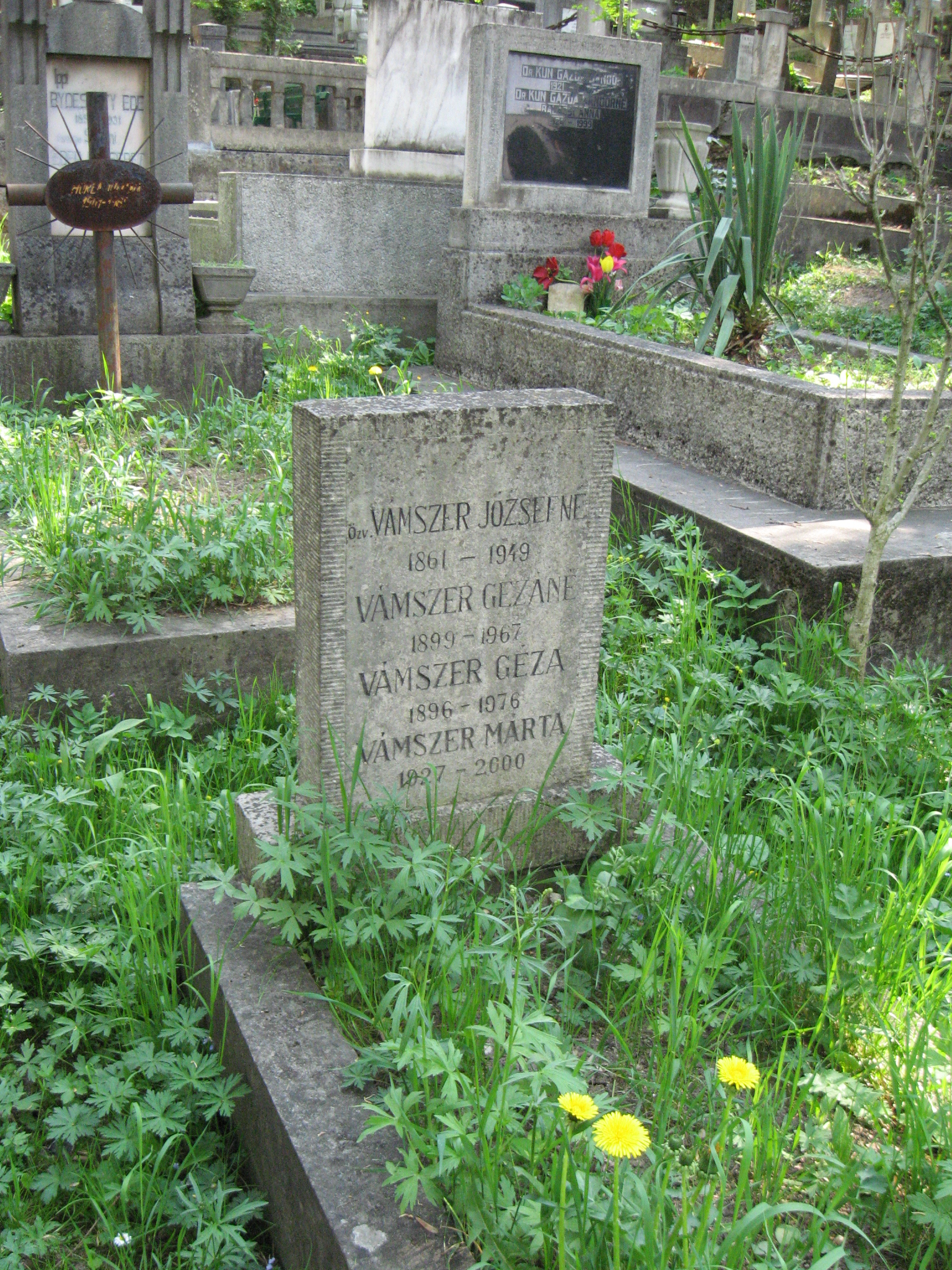 Házsongárdi temető: Vámszer Géza sírja